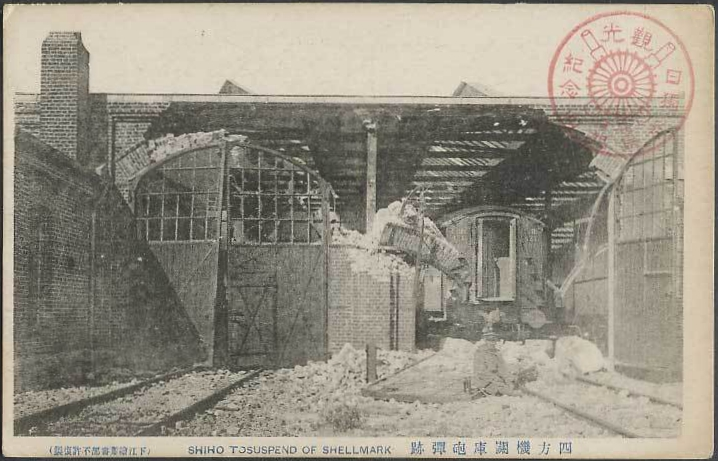 青岛四方机厂受损情况